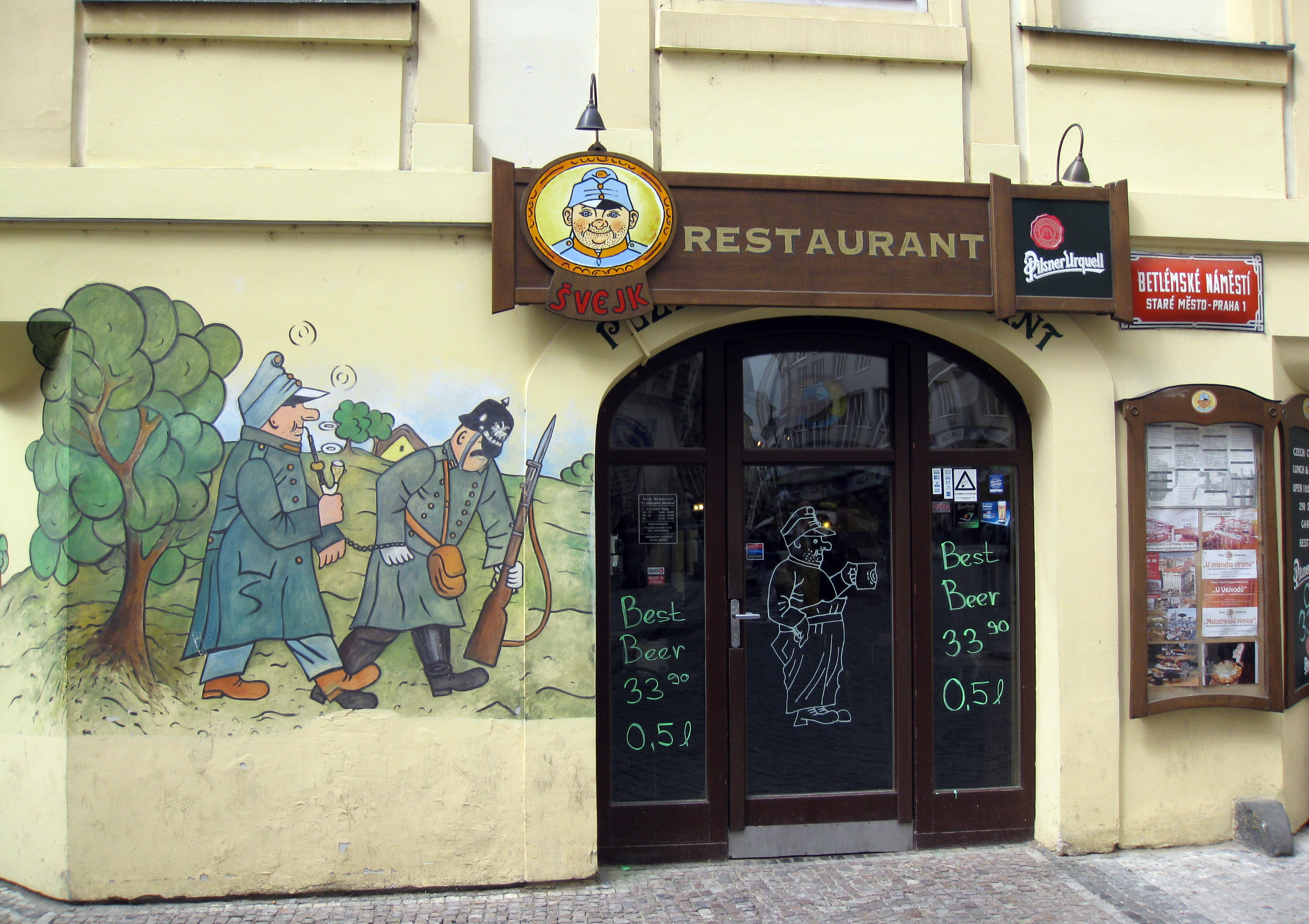 Měšťanský dům U zeleného hroznu (Staré Město), Praha 1, Betlémské nám., Husova 351/6, Staré Město